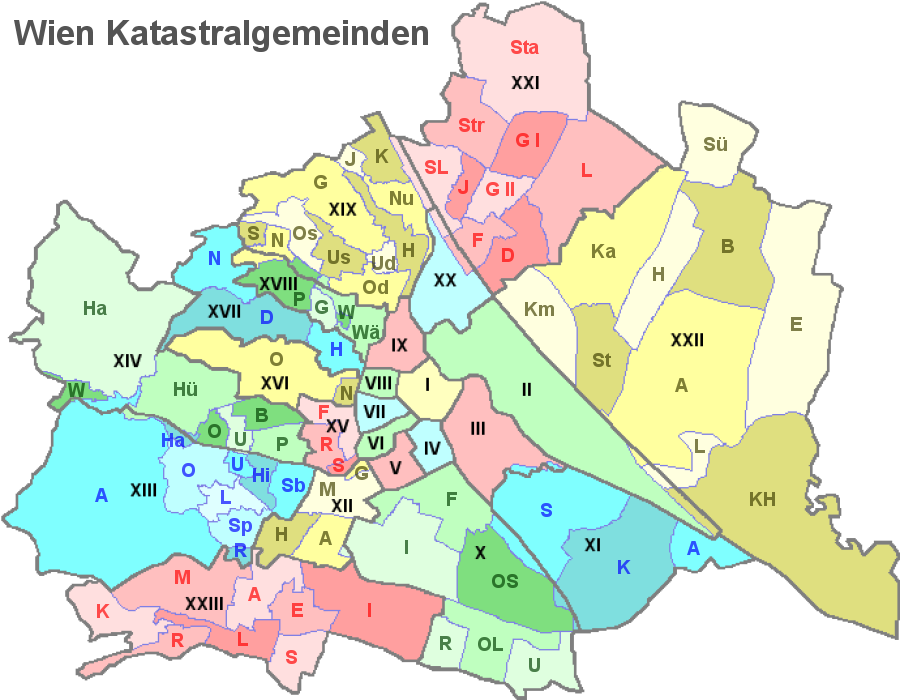 Katastralgemeinden in Wien